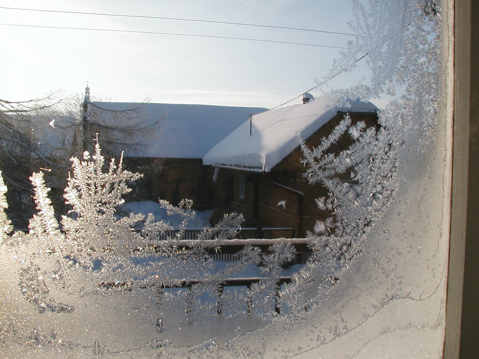 Frosty window.